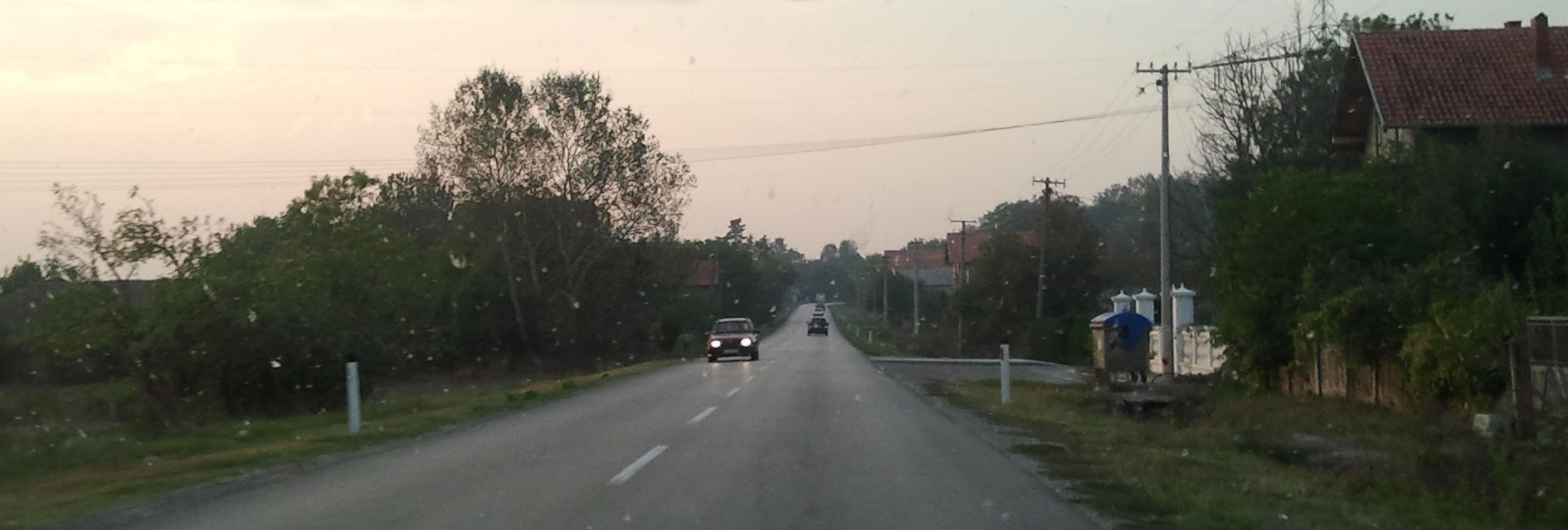 Трновче (Петровац) - Trnovče (Petrovac)